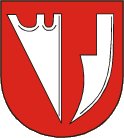 znak obce